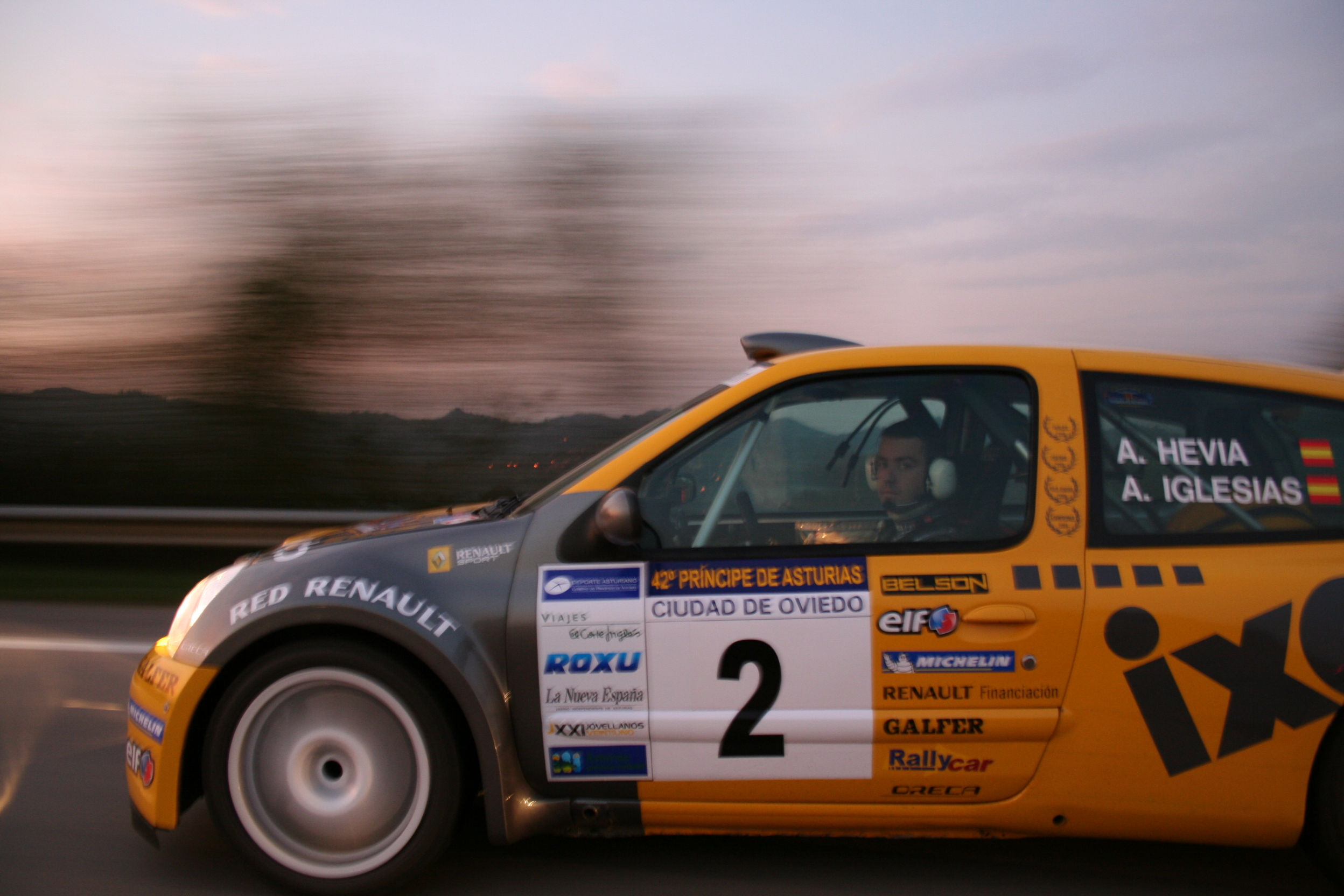 Piloto Alberto Hevia en un coche modelo Renault Clio S1600, Rally Príncipe de Asturias, 2005